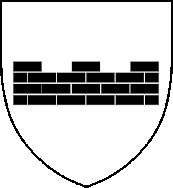 Vapensköld för tysk-baltiska och svenska adelsätten Wrangel